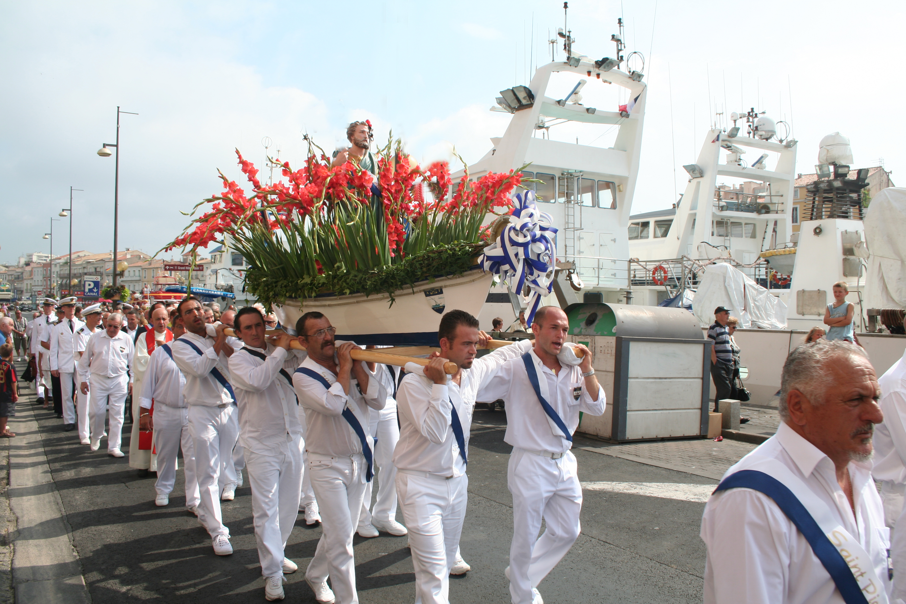 Sète (Hérault) - fêtes de la Saint-Pierre (2008) - la barque de Saint-Pierre arrive au port.